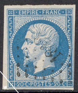 France stamp 20 centime bleu (subtype 2)